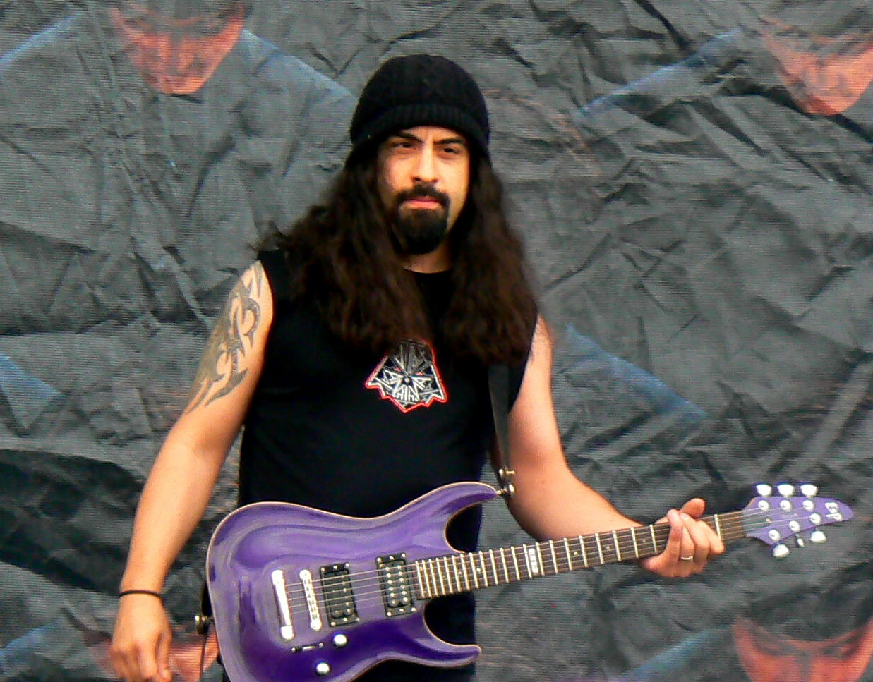 Rob Caggiano